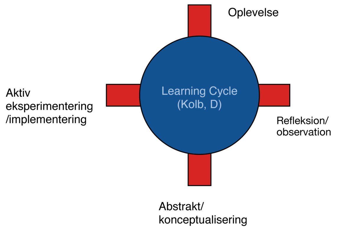 Model over David A. Kolb's læringsscyklus - Action Learning læringscyklus.